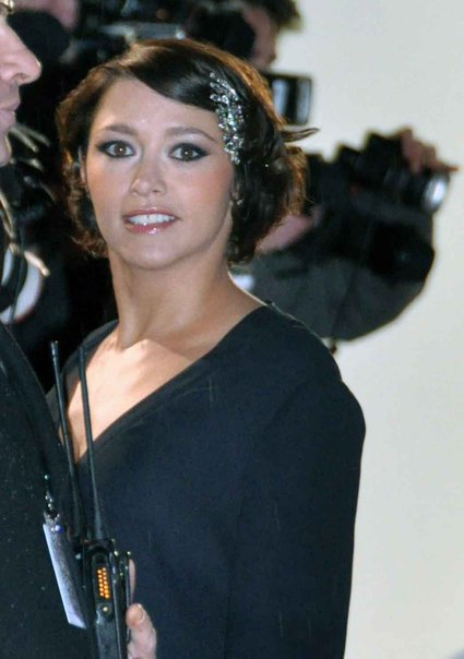 Emma de Caunes à la Cérémonie des Césars 2010